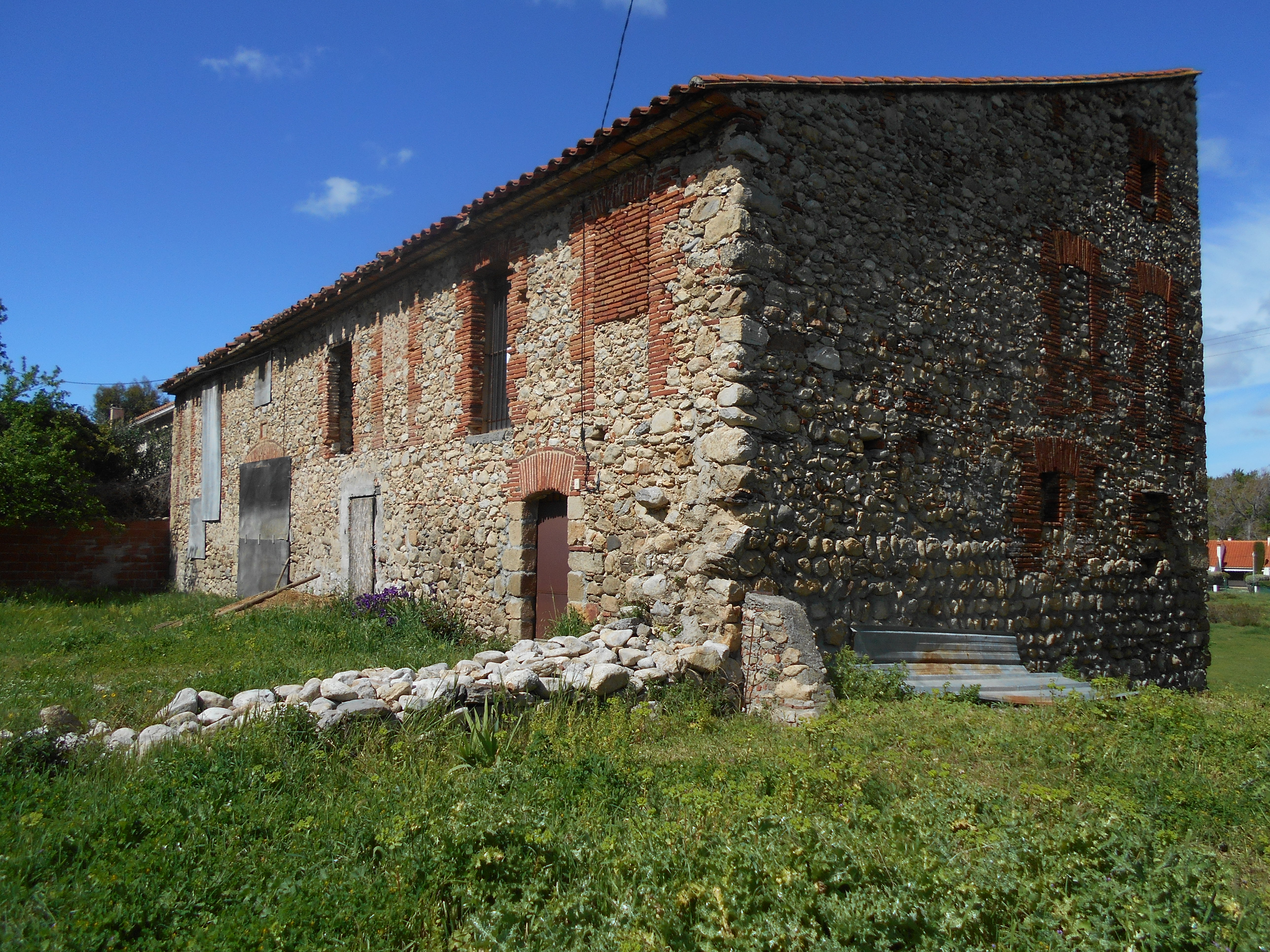 El Mas Pujols